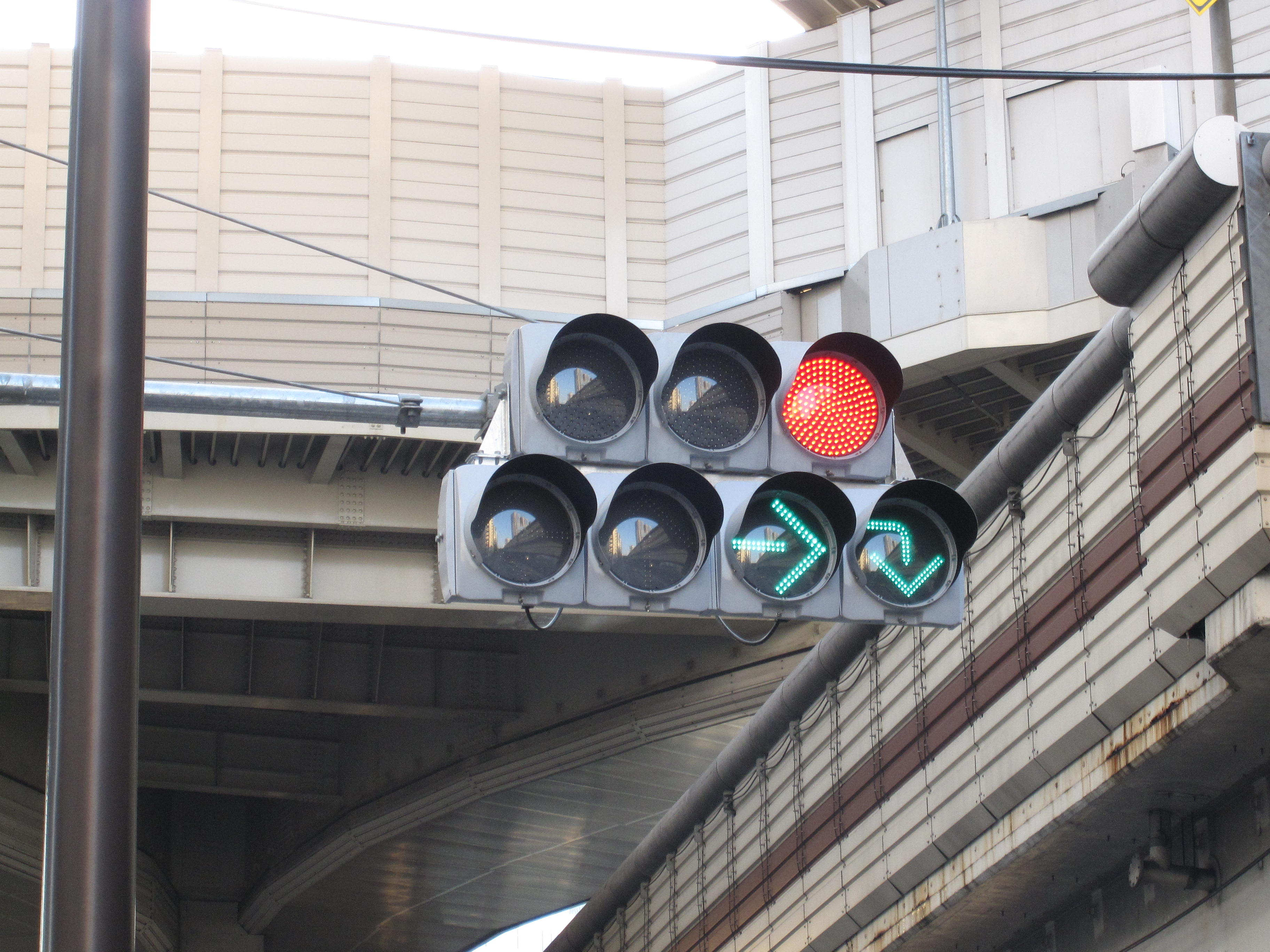 転回信号